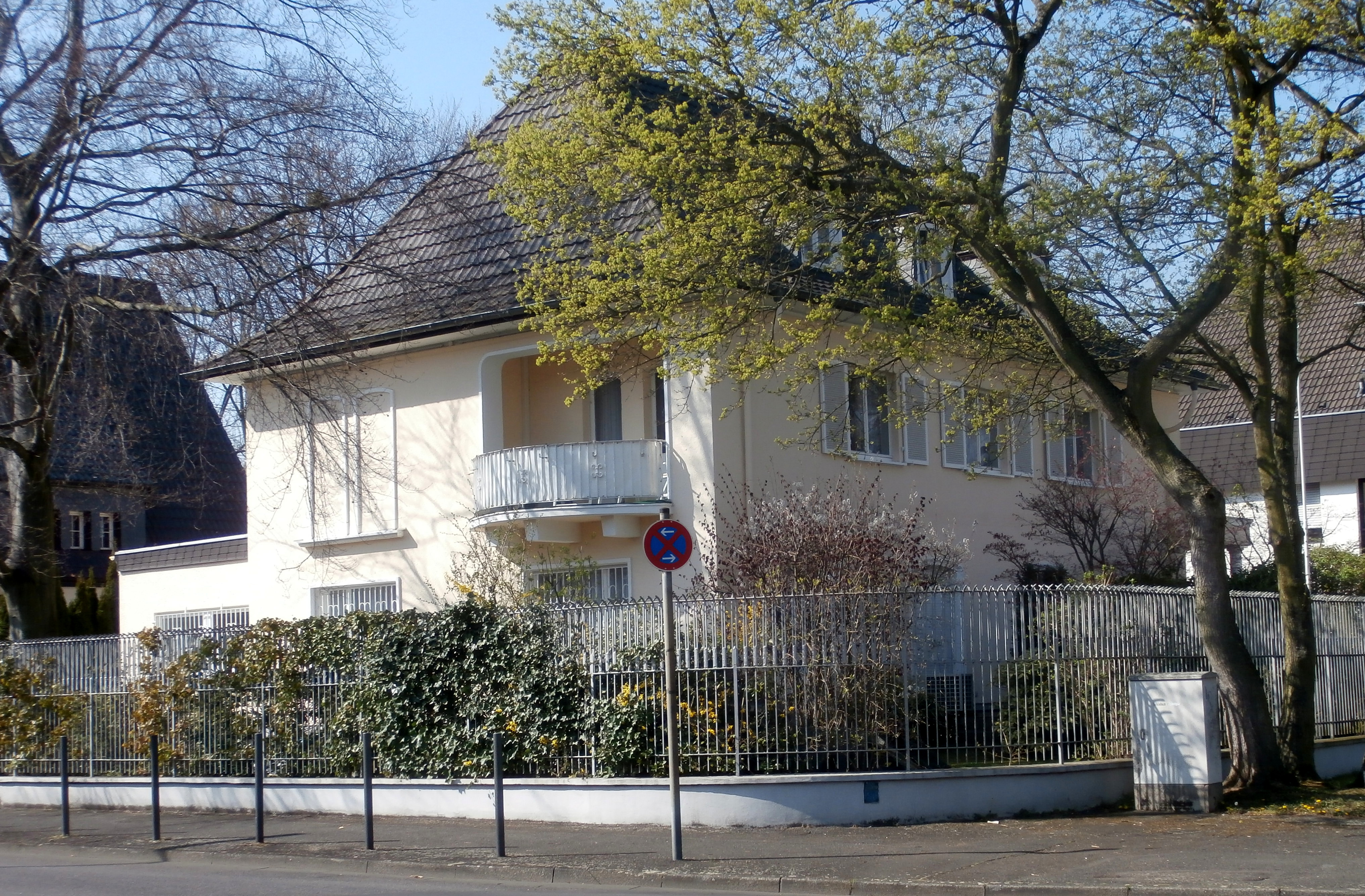 Ehemalige Residenz der Botschaft von Israel, Fasanenstraße 30 (Ecke Am Finkenherd), Rüngsdorf, Bad Godesberg